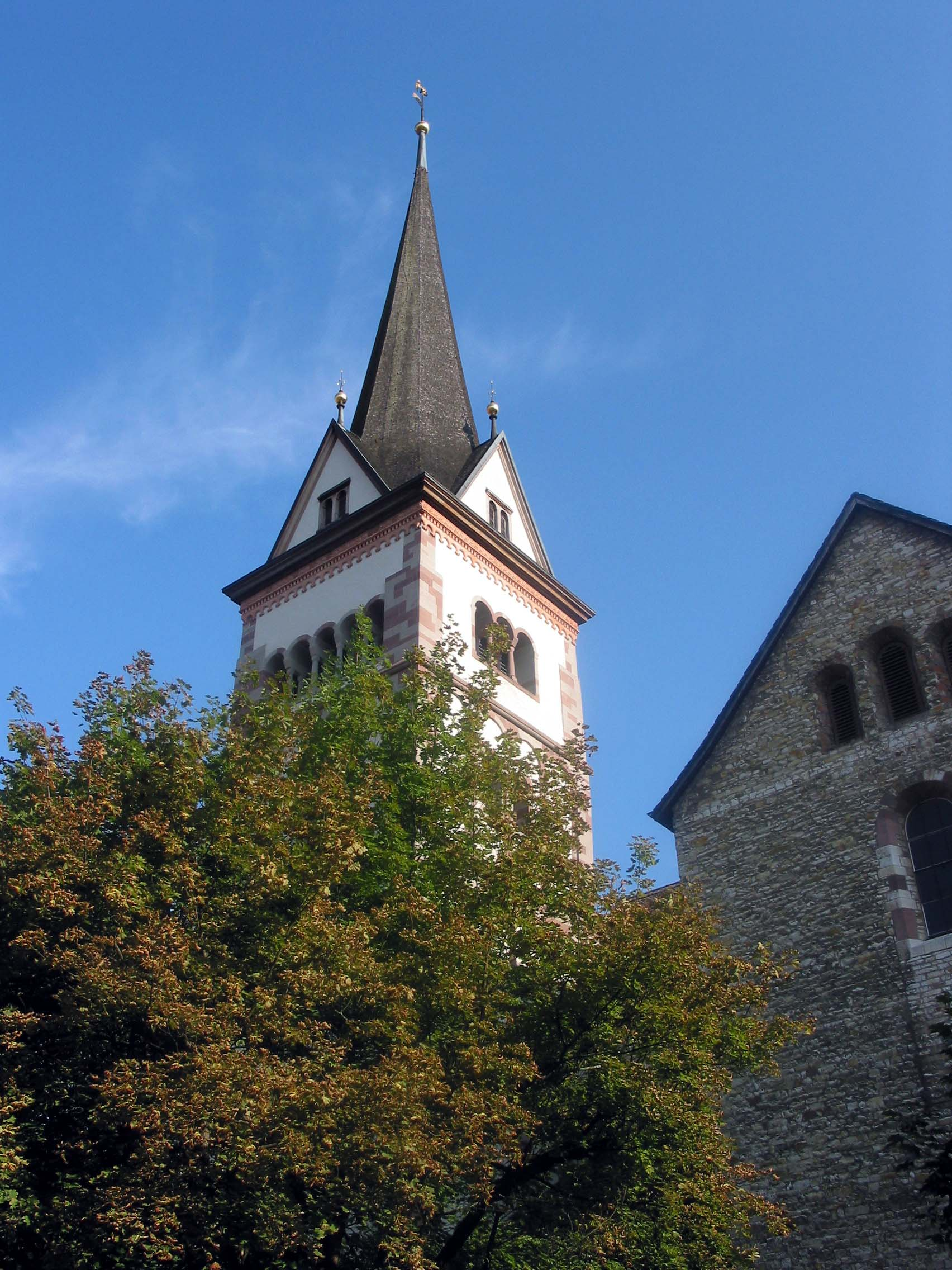 Turm des Münsters des Klosters Allerheiligen in Schaffhausen